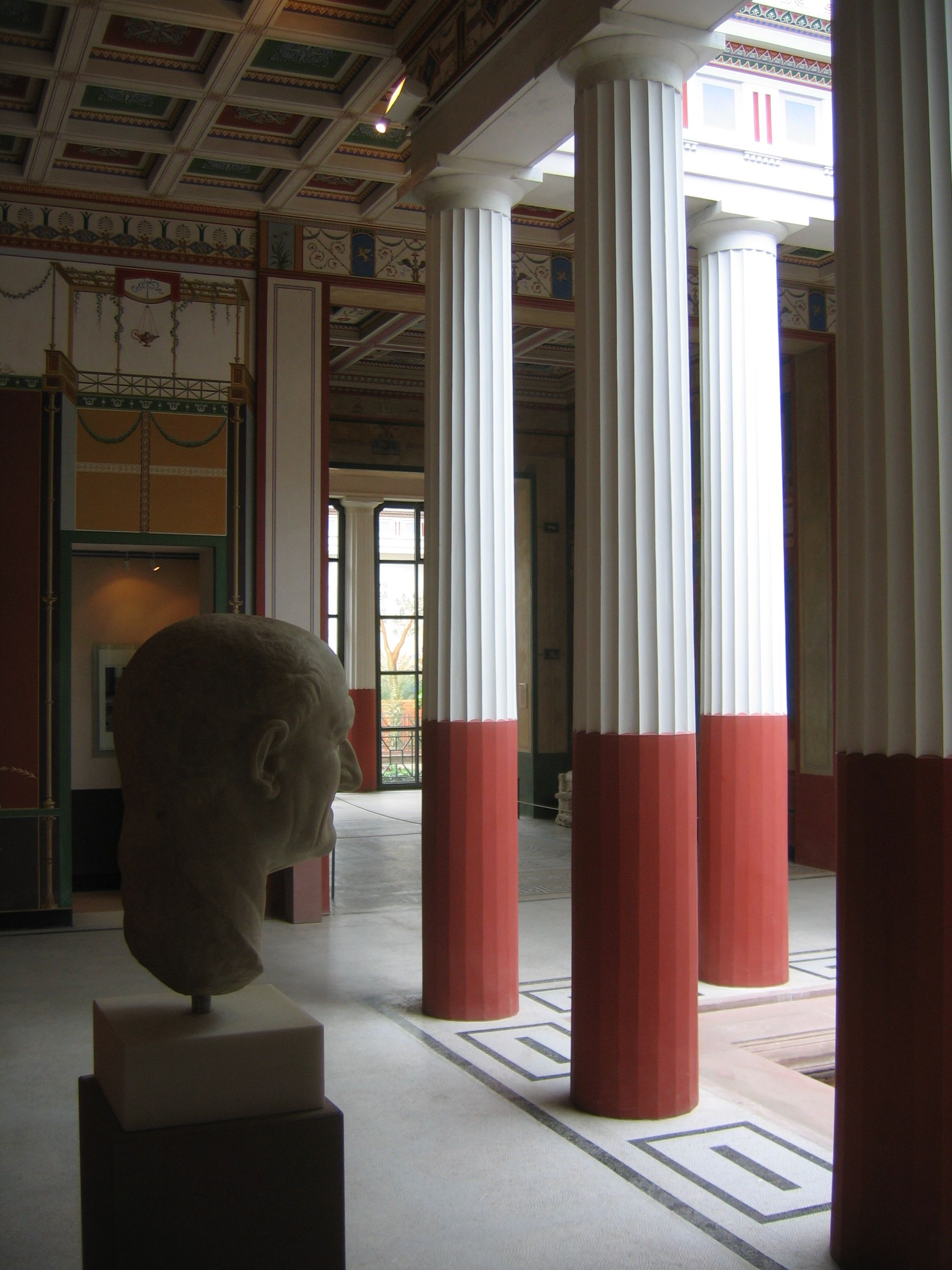 Pompeijanum, innen